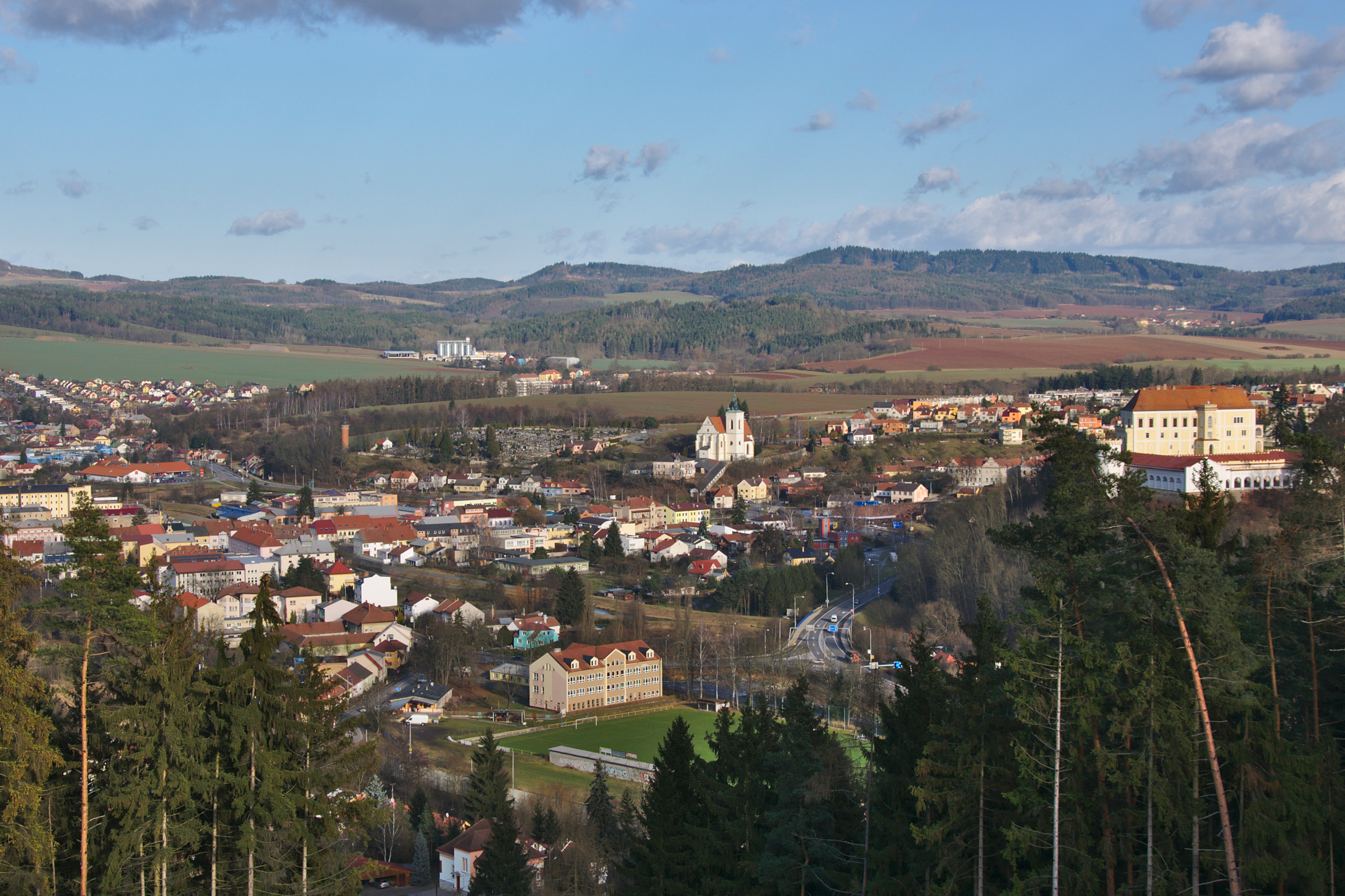 Pohled na město od západu, Letovice, okres Blansko